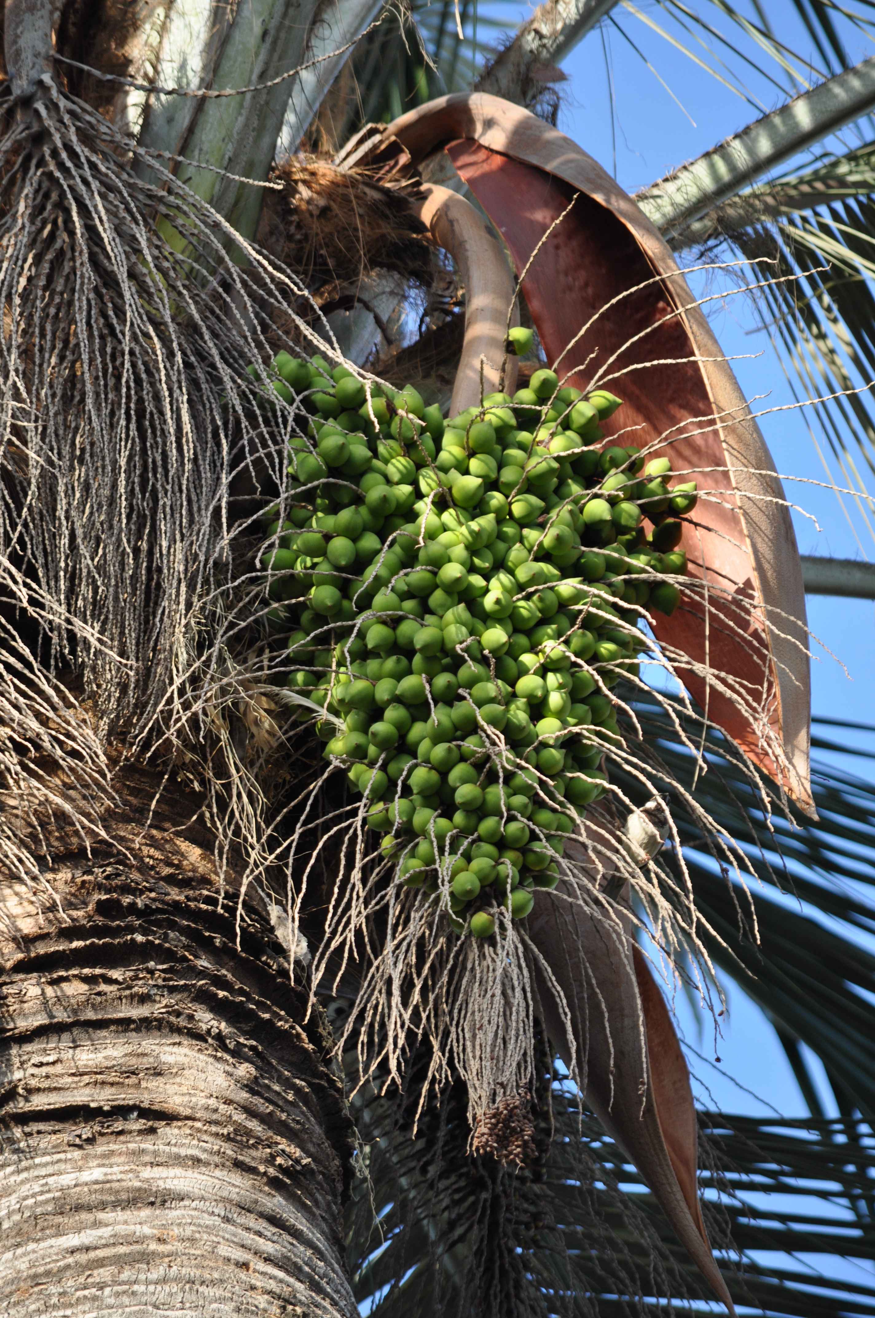 Detalle de la formación de frutos de la palma chilena. En la imagen (comienzo del verano) los cocos aún no están maduros, pero ya han alcanzado su tamaño máximo (aproximadamente unos 3 a 4 centímetros de diámetro, en cuyo interior está la semilla, el "coquito" , aproximadamente de unos 2 centímetros de diámetro). En la imagen se aprecia además la valva leñosa que protege la inflorescencia durante el desarrollo de los frutos.